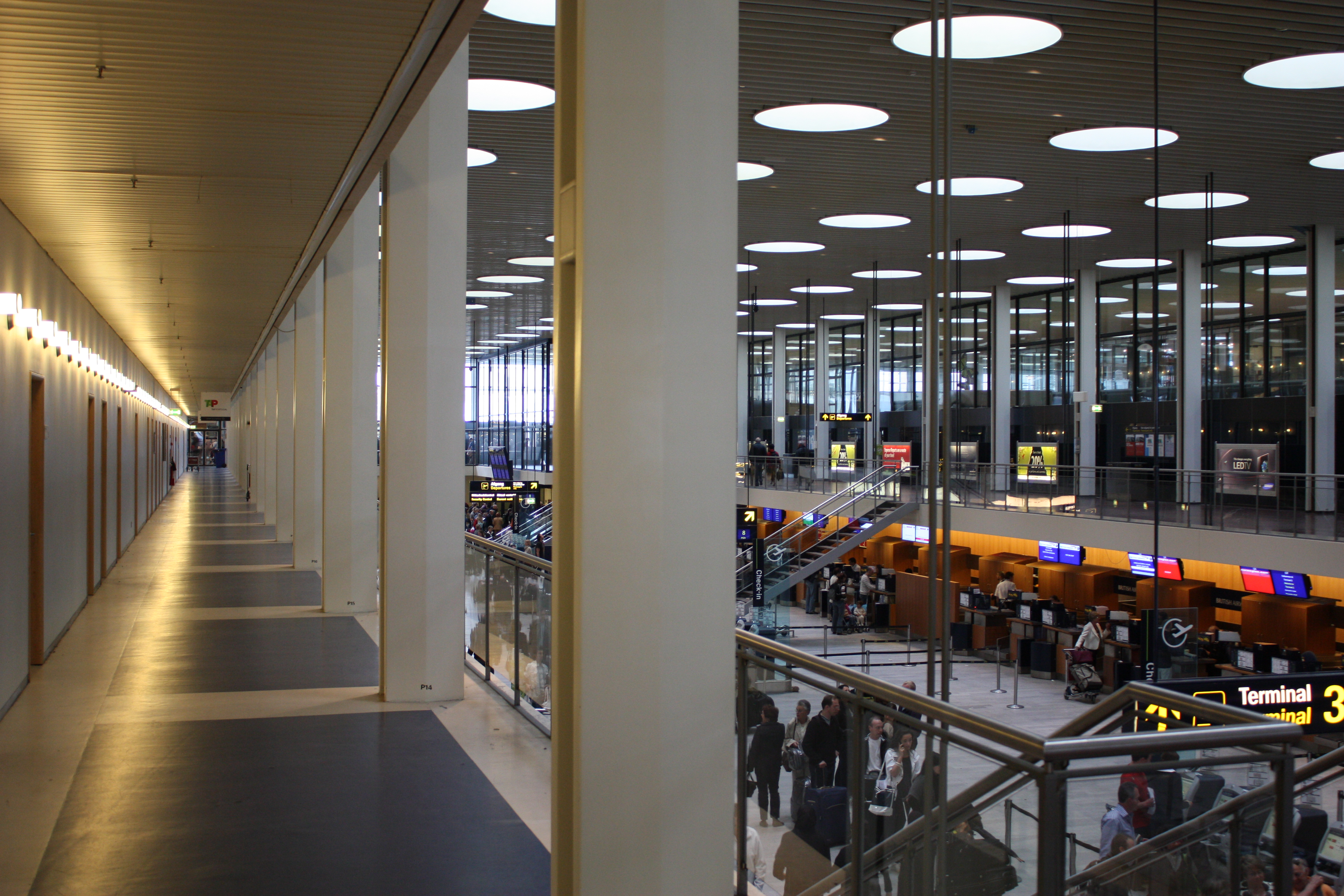 Flughafen Kopenhagen 2009